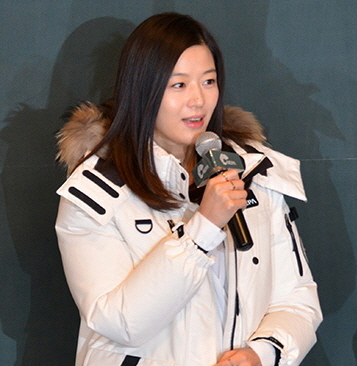 네파 따뜻한 세상 캠페인 전지현 홍보대사 위촉식